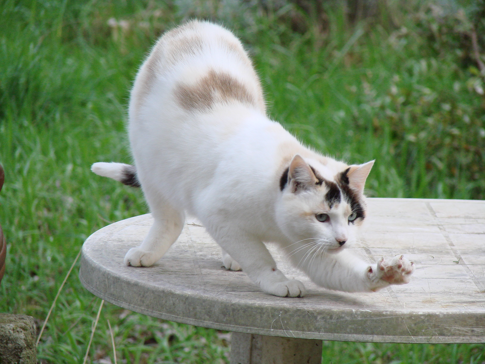 Photographie d'un chat blanc en train de s'étirer.